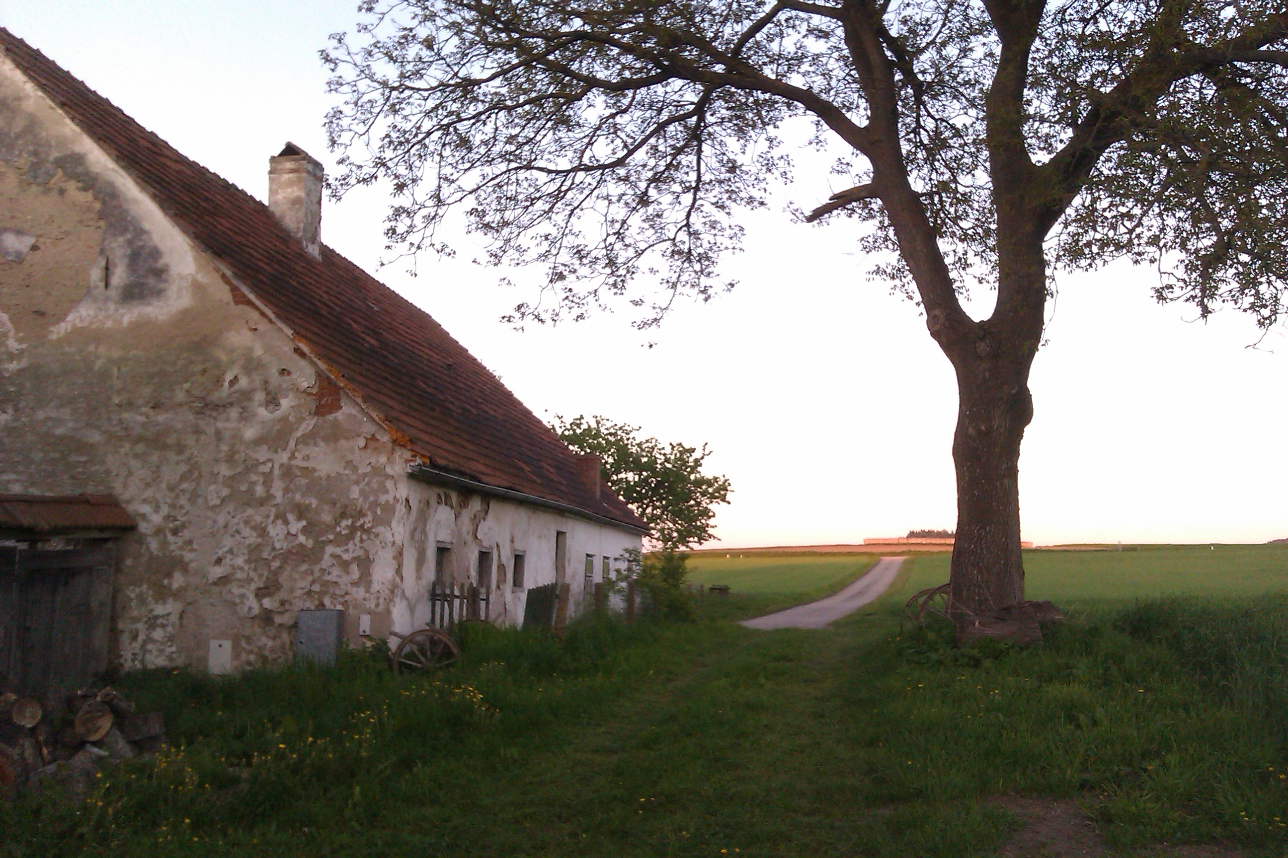 Hof im Ortsteil Eisenbergeramt in Jaidhof, Niederösterreich. Dieses Bild stellt einen der Drehorte des Films Revanche dar.